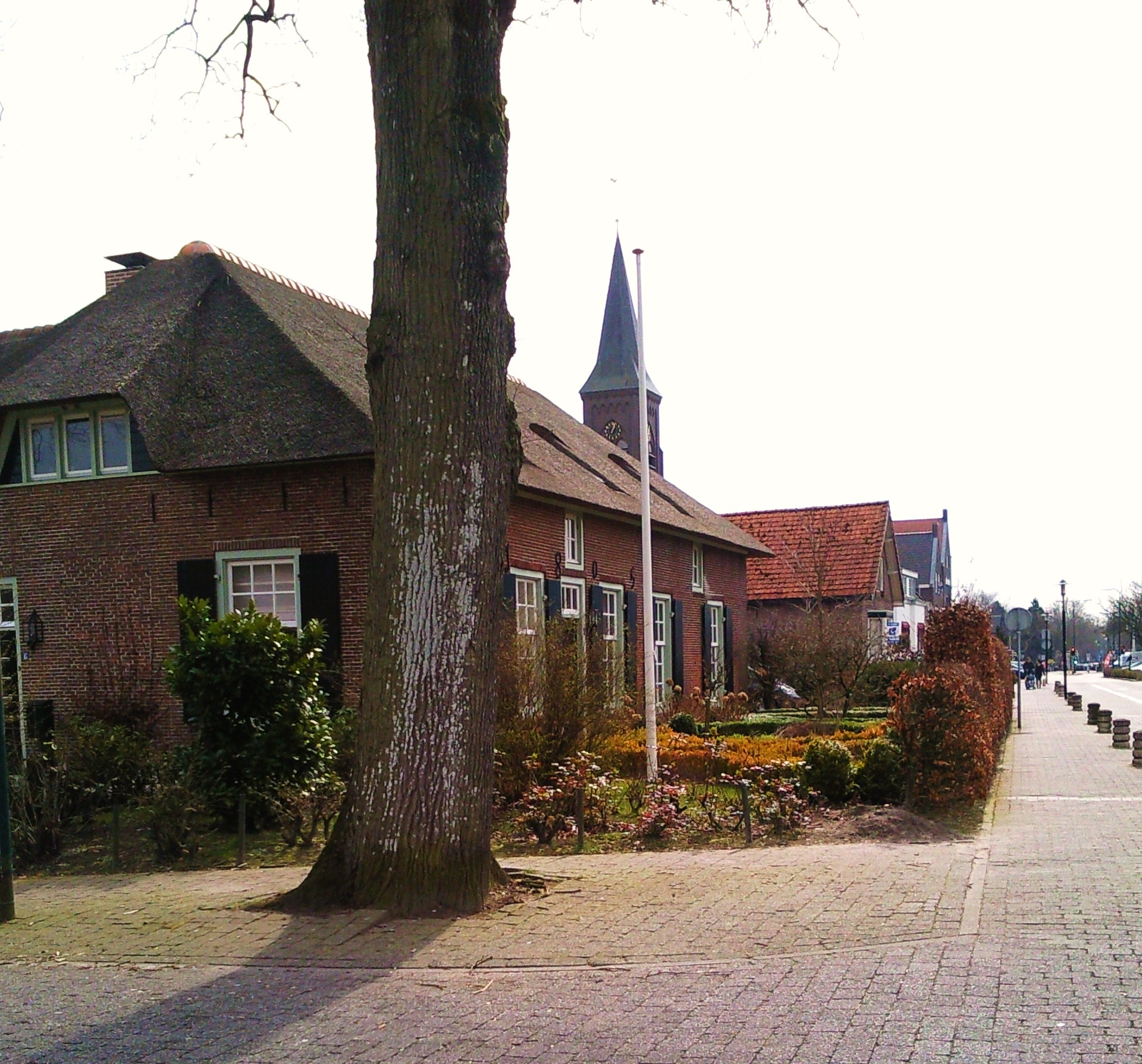 Het oude stadscentrum van Leusden. Met op de achtergrond de St. Josephkerk uit 1841.